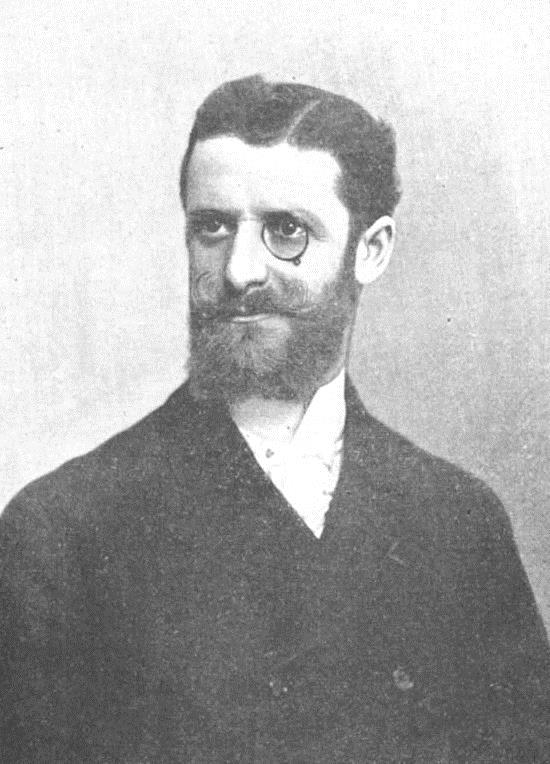 "Paul Bluysen, secrétaire général du Journal des débats".